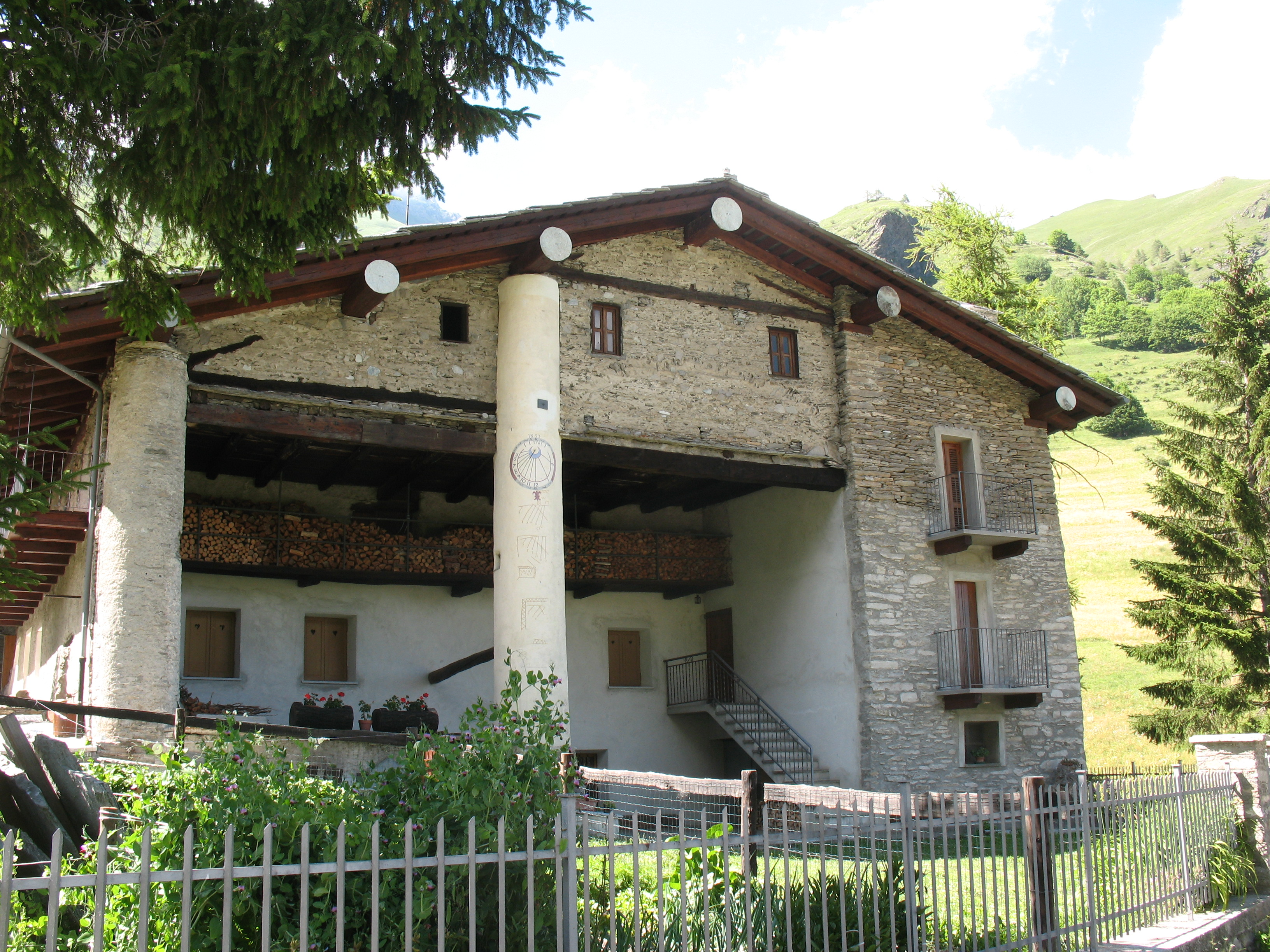 Hof in Celle di Bellino